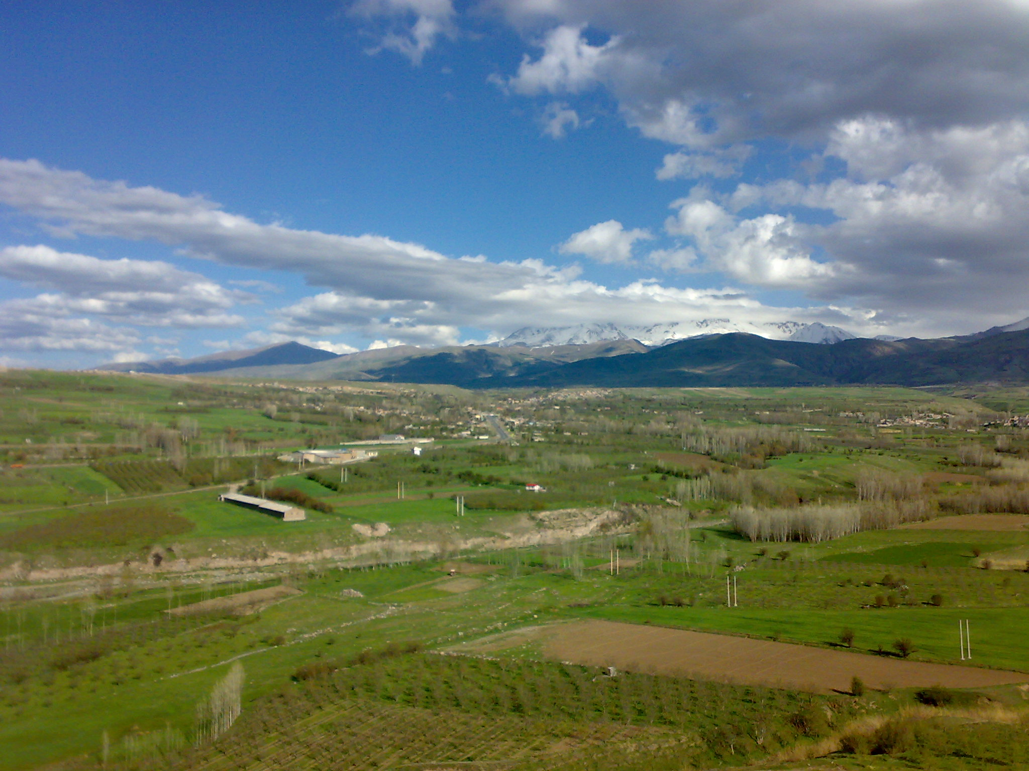 در فصول مختلف